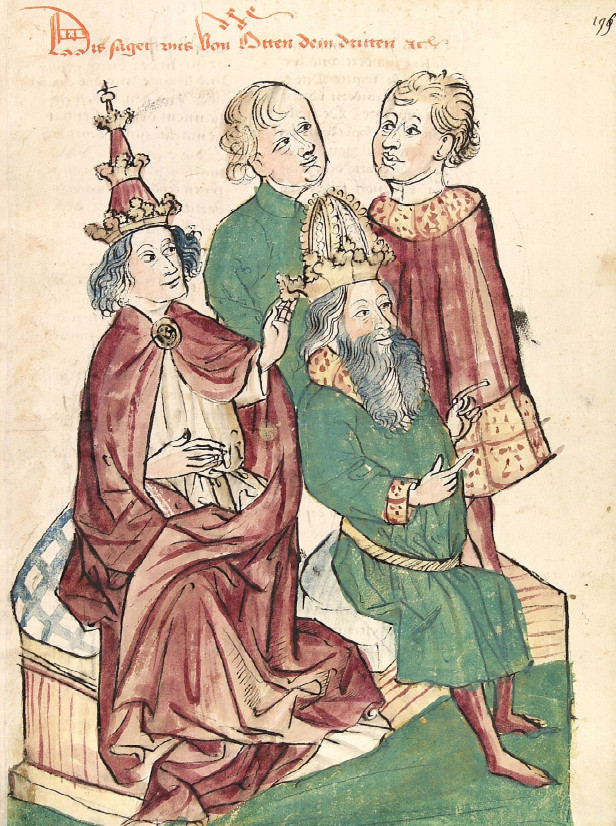 Otto III. wird von Papst Gregor V. zum Kaiser gesalbt Werkstatt des Diebold Lauber, unbekannter Künstler, um 1450 Zeichnung (ganzseitig), ungerahmt, Feder & koloriert, Wasserfarbe & Deckfarbe Der thronende Papst Gregor V. salbt den vor ihm sitzenden (!) Otto III., der ihm den Rücken zugewandt hat. Im Hintergrund schauen zwei Höflinge der Szene zu.